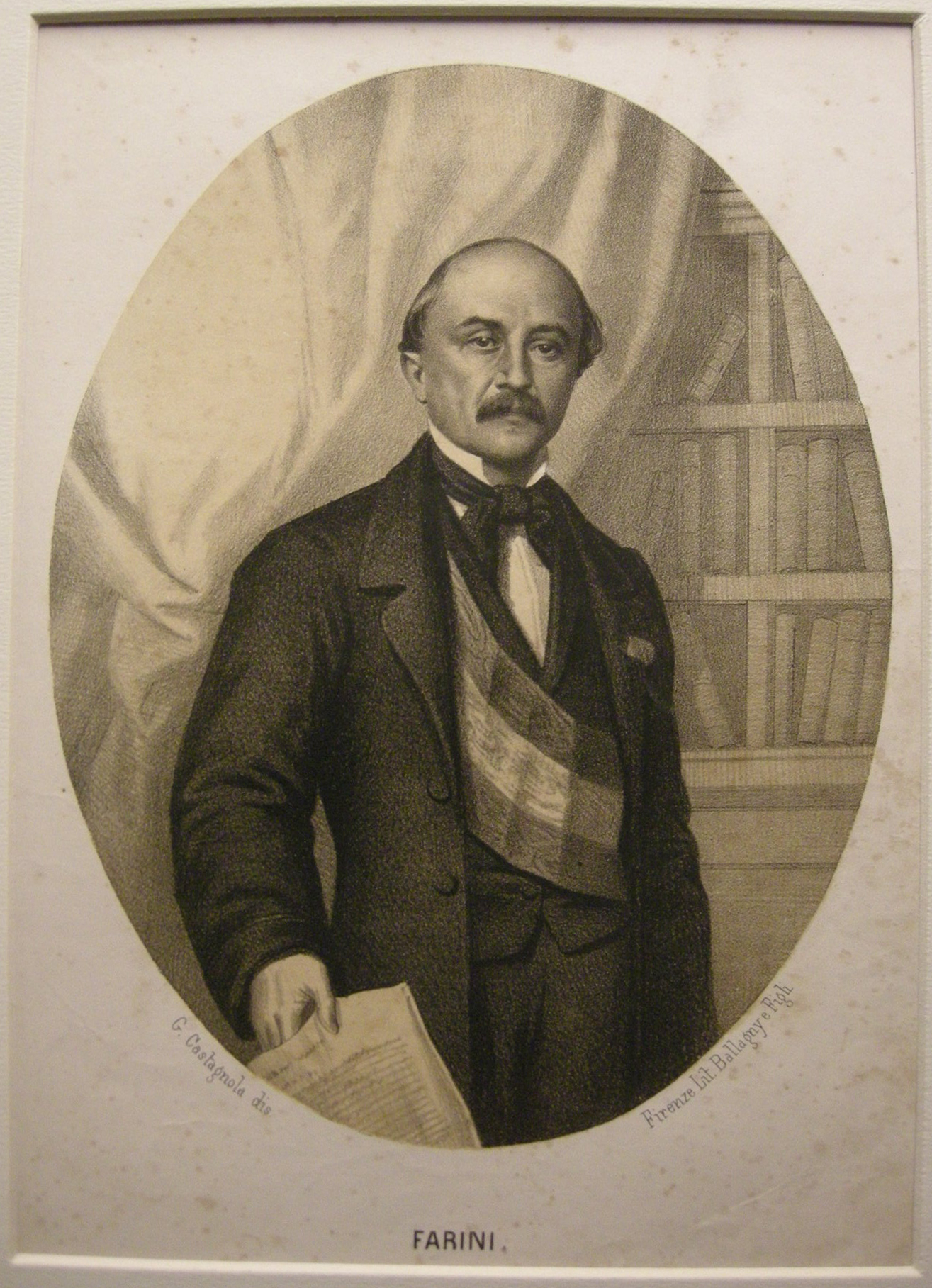 Litografia ballagny, fine XIX sec. luigi carlo farini